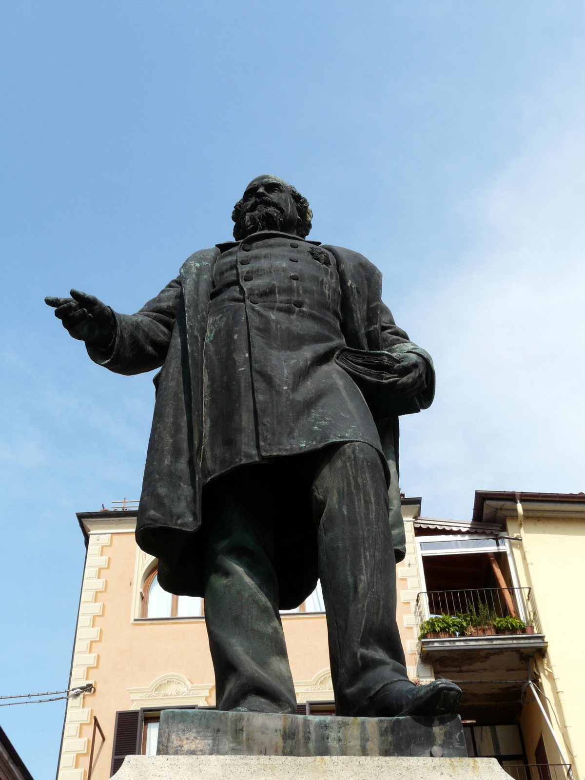 Monumento a Giovanni Garelli, Mondovì, Piemonte, Italia